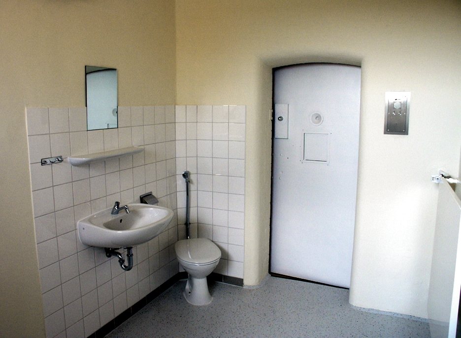 Haftraum (renoviert) in Santa Fu, Hamburg (Pressetermin 7.4.2006)